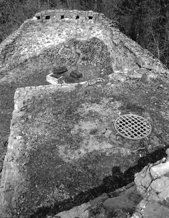 Ruine Scheidegg, Tecknau, Sodbrunnen und spaeterer Teil